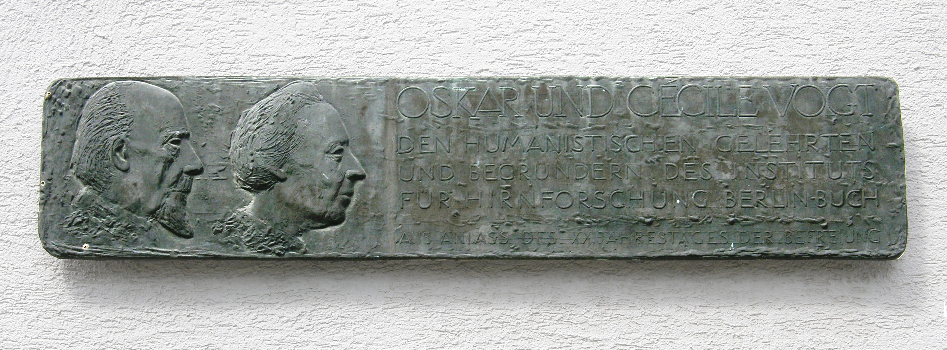 Gedenktafel für Oskar und Cécile Vogt am Gebäude des von ihnen gergründeten Instituts für Hirnforschung in Berlin-Buch. Geschaffen wurde die Gedenktafel 1965 vom Bildhauer Axel Schulz.